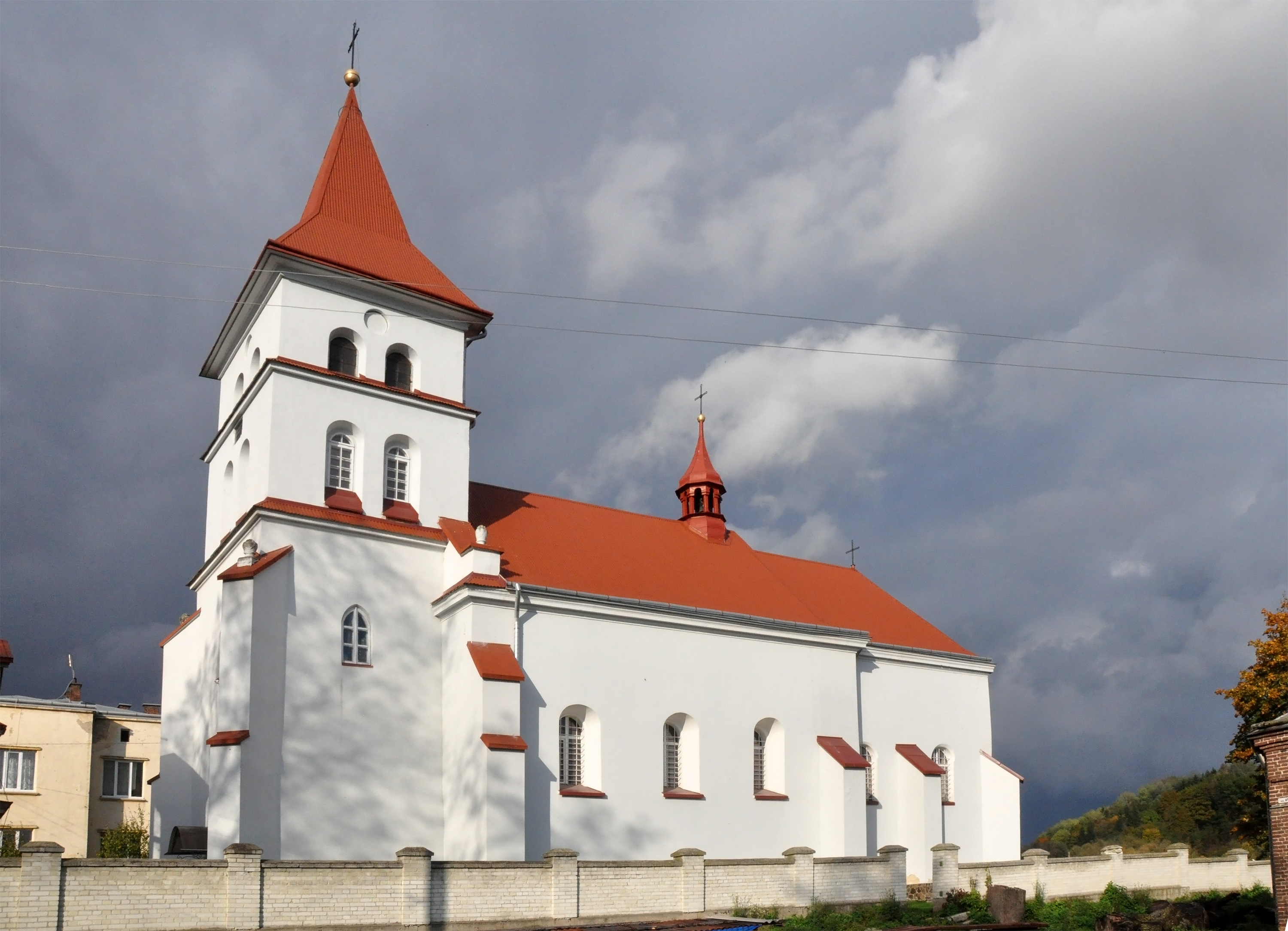 Костел Св.Станіслава (мур.), смт.Щирець